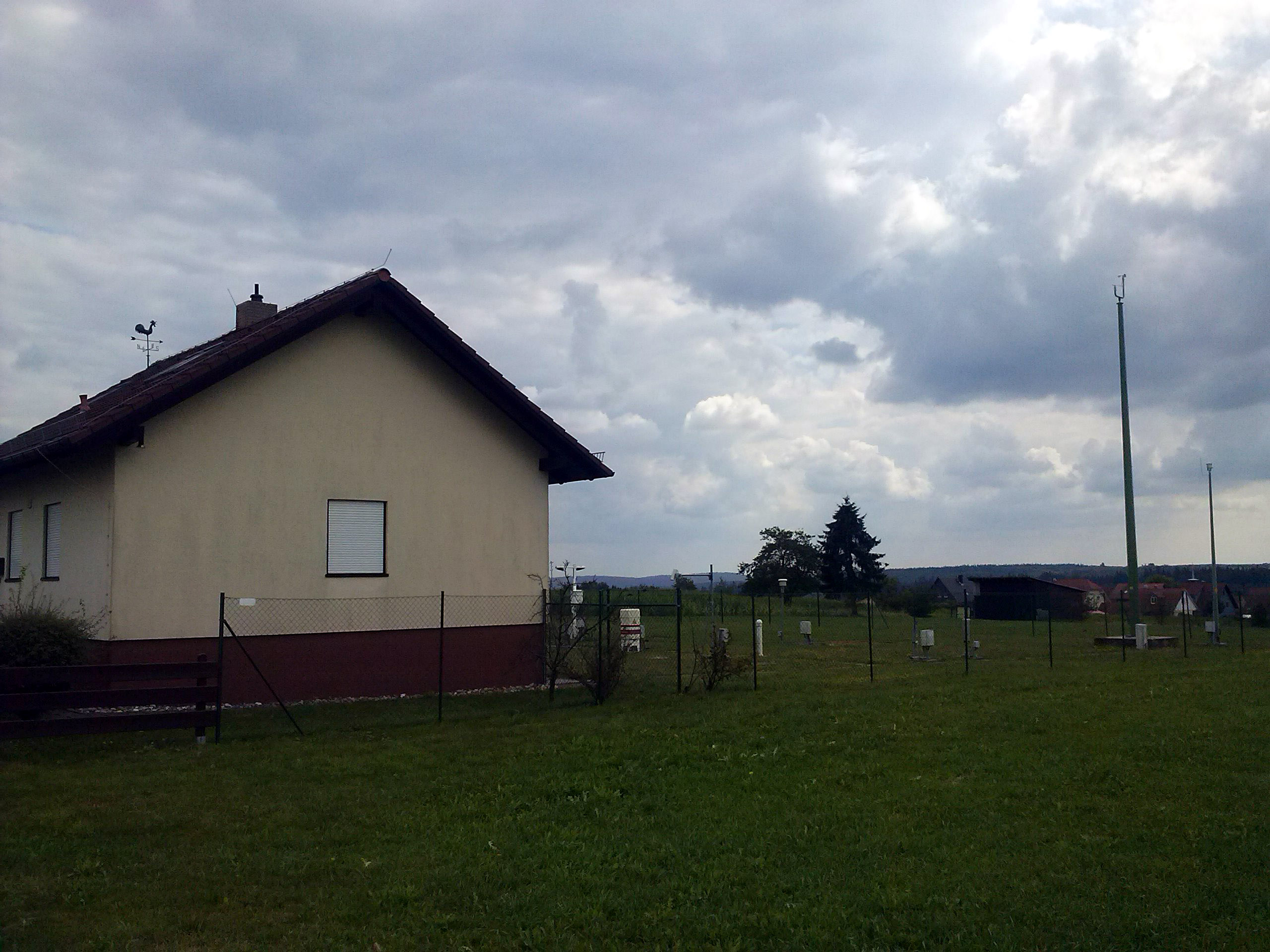 Die Wetterwarte des Deutschen Wetterdienstes in Vielbrunn (Odenwald).